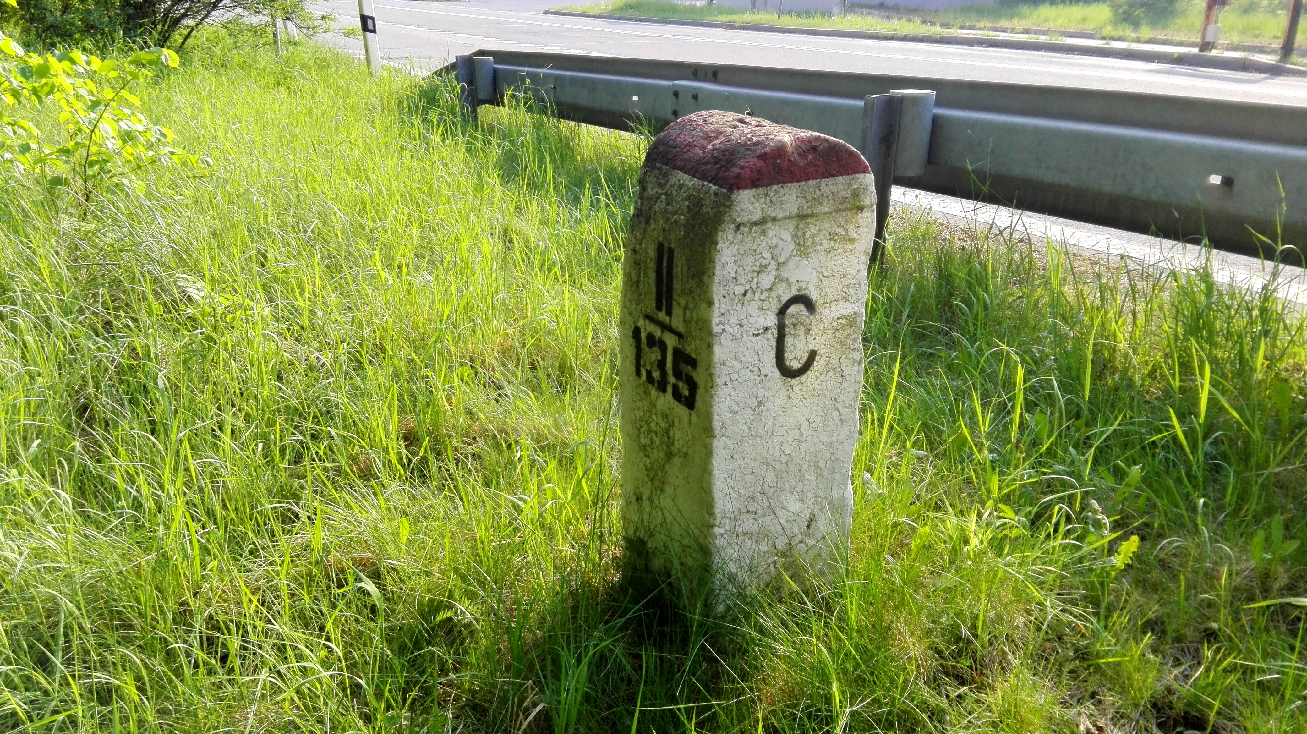 Dawne przejście graniczne Trzebina-Bartultovice, znak graniczny nr II/135 - widok od strony polskiej